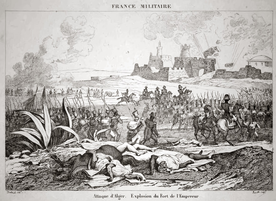 Gravure ancienne, extraite de France Militaire: "Attaque d'Alger. Explosion du Fort de l'Empereur." juillet 1830